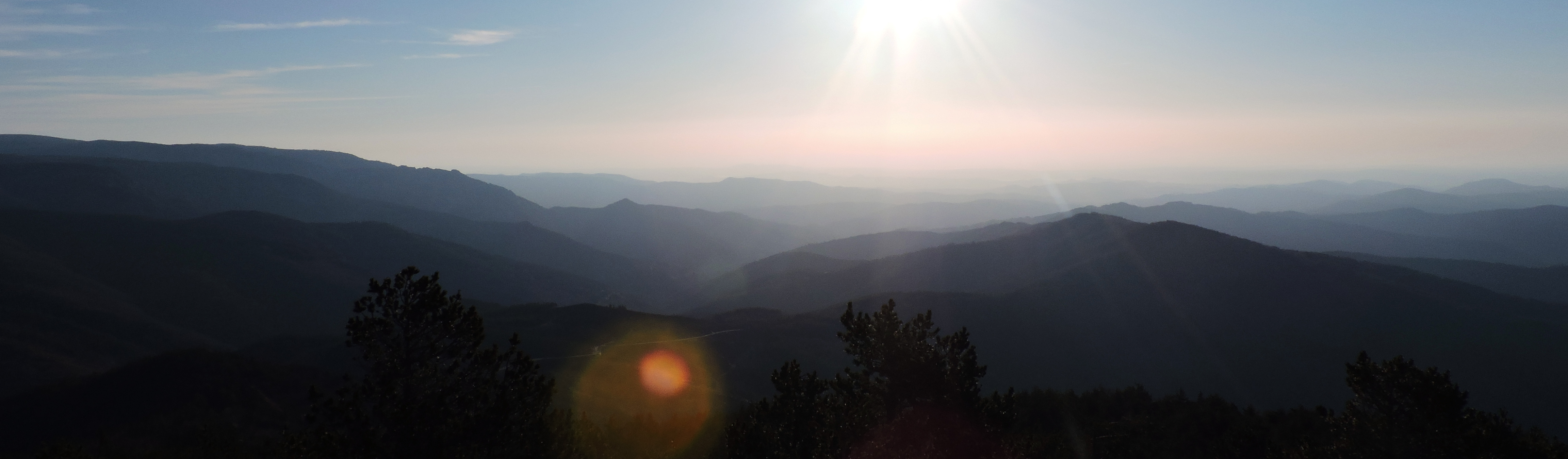 Vue depuis le sommet du Signal de Ventalon.